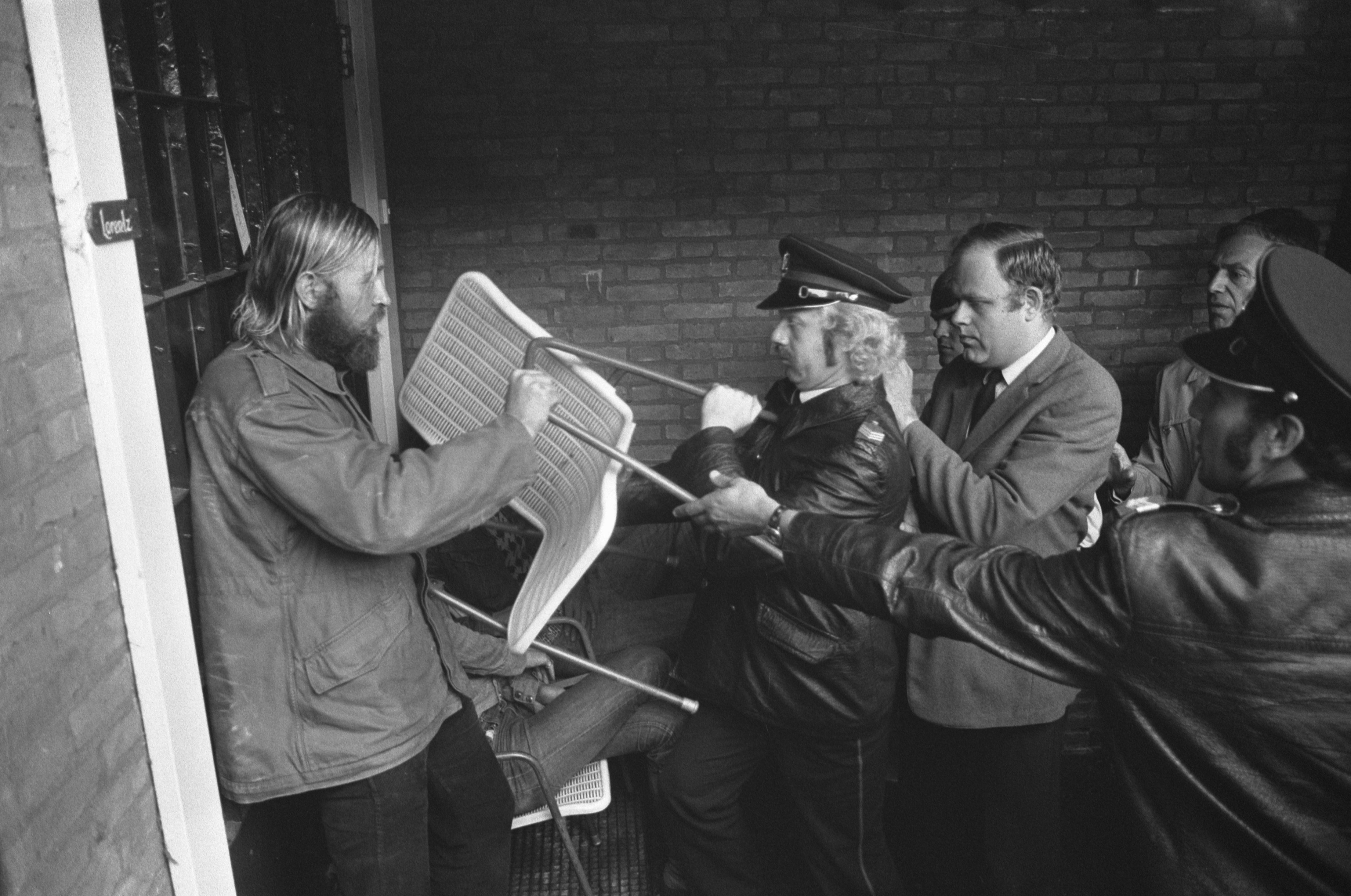 Collectie / Archief : Fotocollectie Anefo Reportage / Serie : [ onbekend ] Beschrijving : Ontruiming Lorentz paviljoen van Dennendal; groepsleider tracht politie met een stoel tegen te houden Datum : 3 juli 1974 Trefwoorden : POLITIE, ontruimingen Persoonsnaam : Dennendal, LORENTZ Fotograaf : Peters, Hans / Anefo Auteursrechthebbende : Nationaal Archief Materiaalsoort : Negatief (zwart/wit) Nummer archiefinventaris : bekijk toegang 2.24.01.05 Bestanddeelnummer : 927-3001